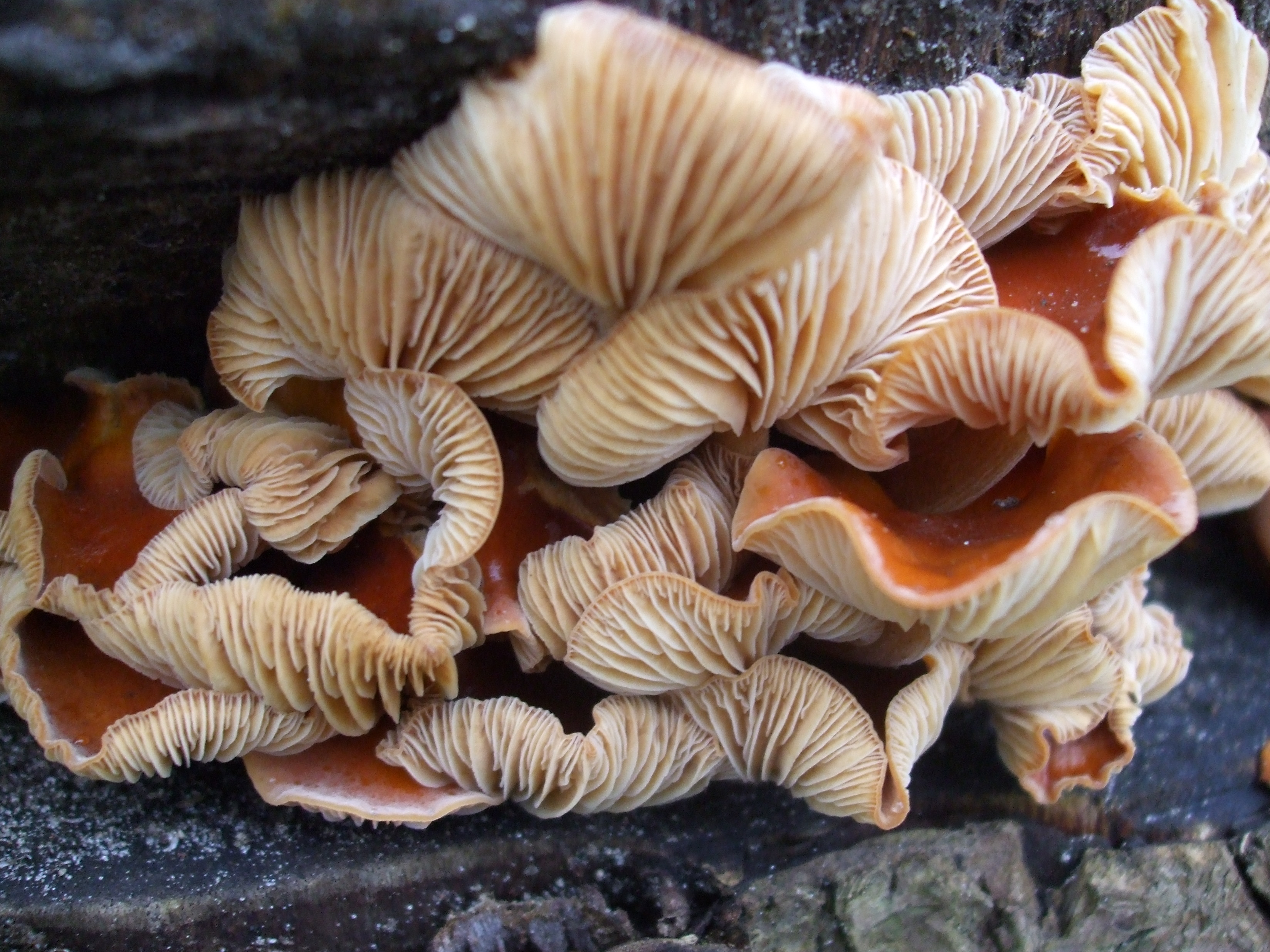 flammulina velutipes Sopot, Poland